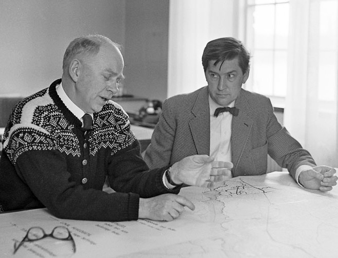 Stadsplanering i Stadshuset, arkitekt Torsten Westman (t.h.) och politikern Joakim Garpe